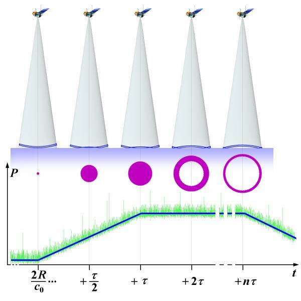 Bei einem Radaraltimeter verformt sich der Echoimpuls auf bis das Vielfache der Länge des Sendeimpulses.